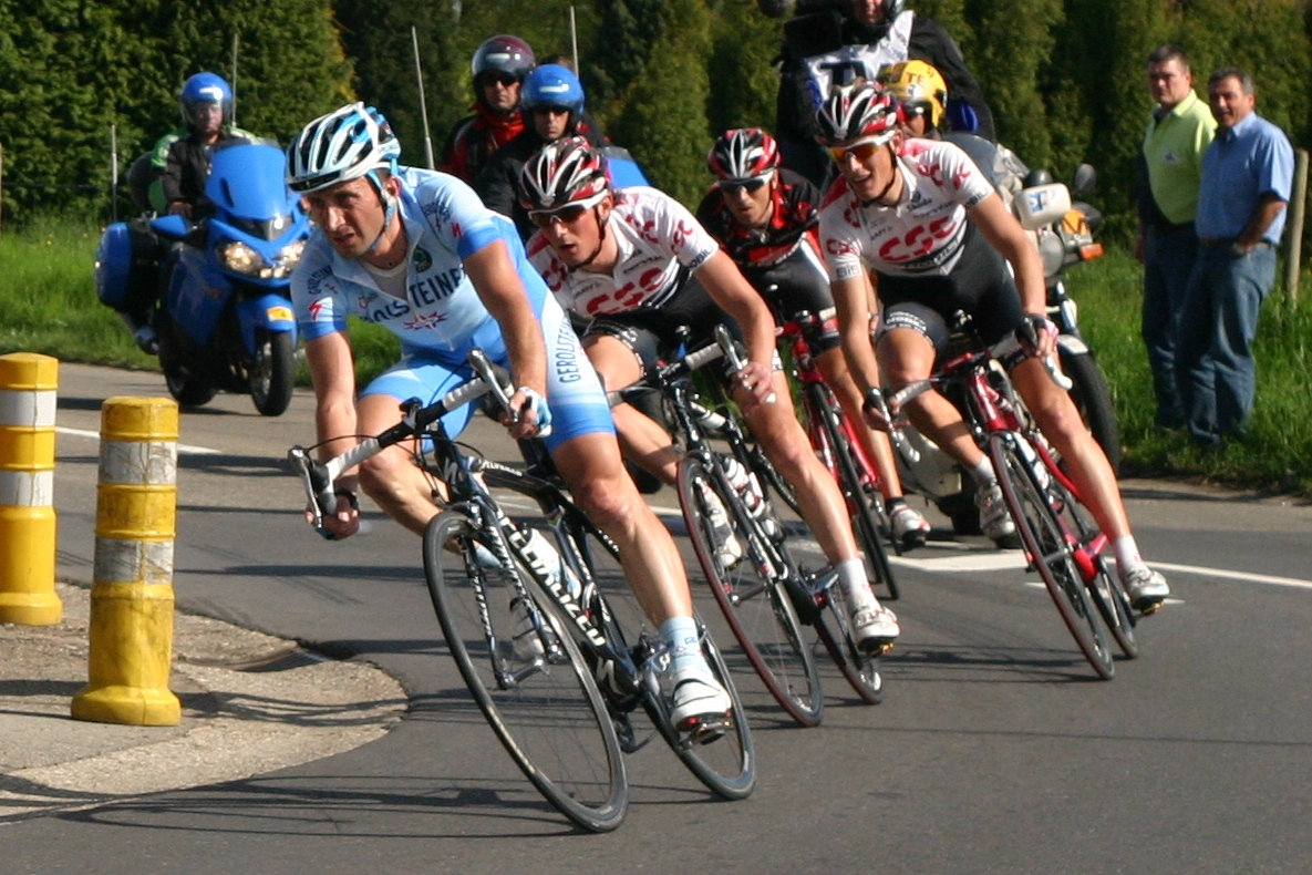 Liège-Bastogne-Liège 2008. Déi Véier Éischt zu Boncelles D. Rebellin, A. Schleck, F. Schleck, A. Valverde.